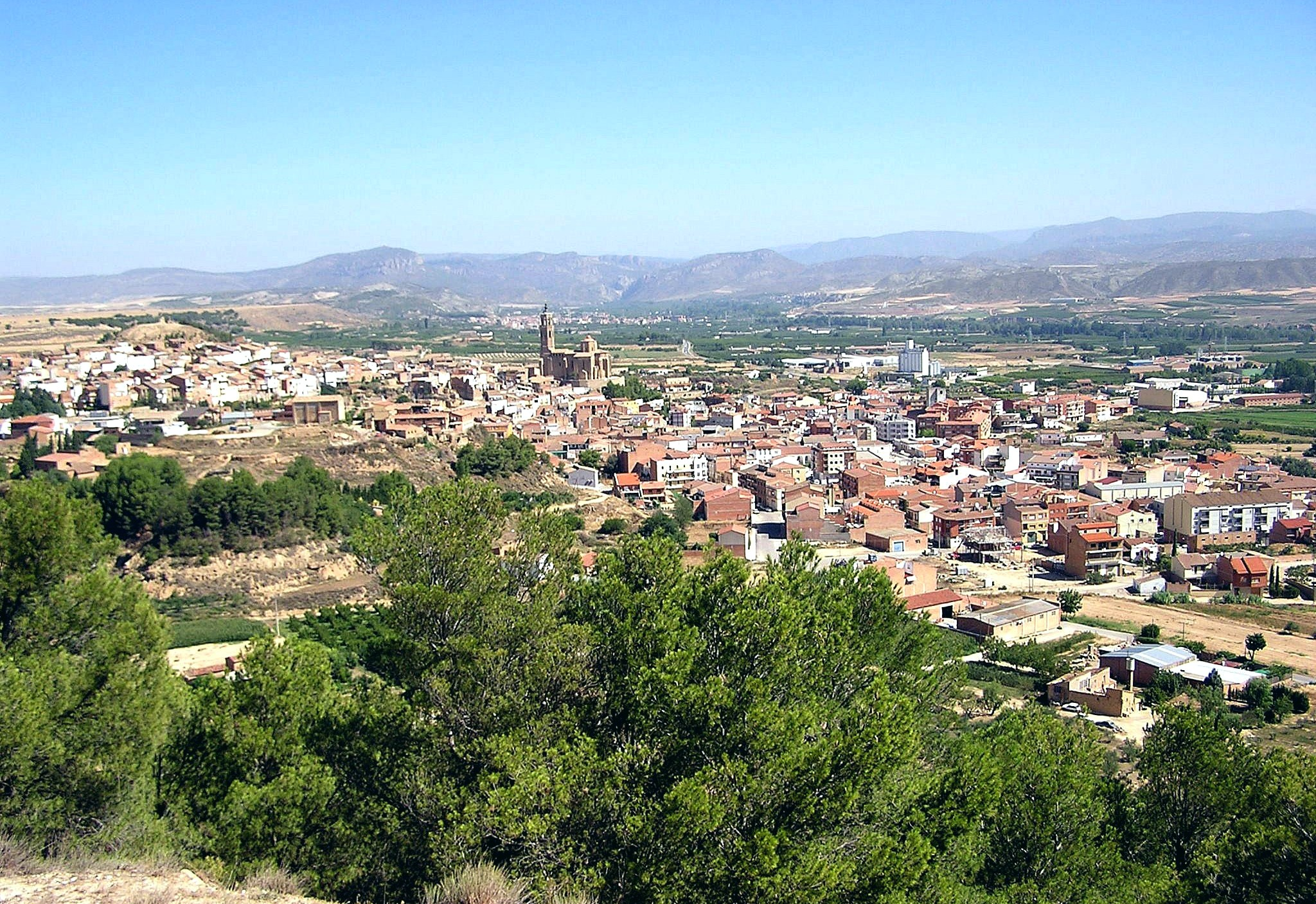 Vila d'Almenar vista des del Plà de Sessal